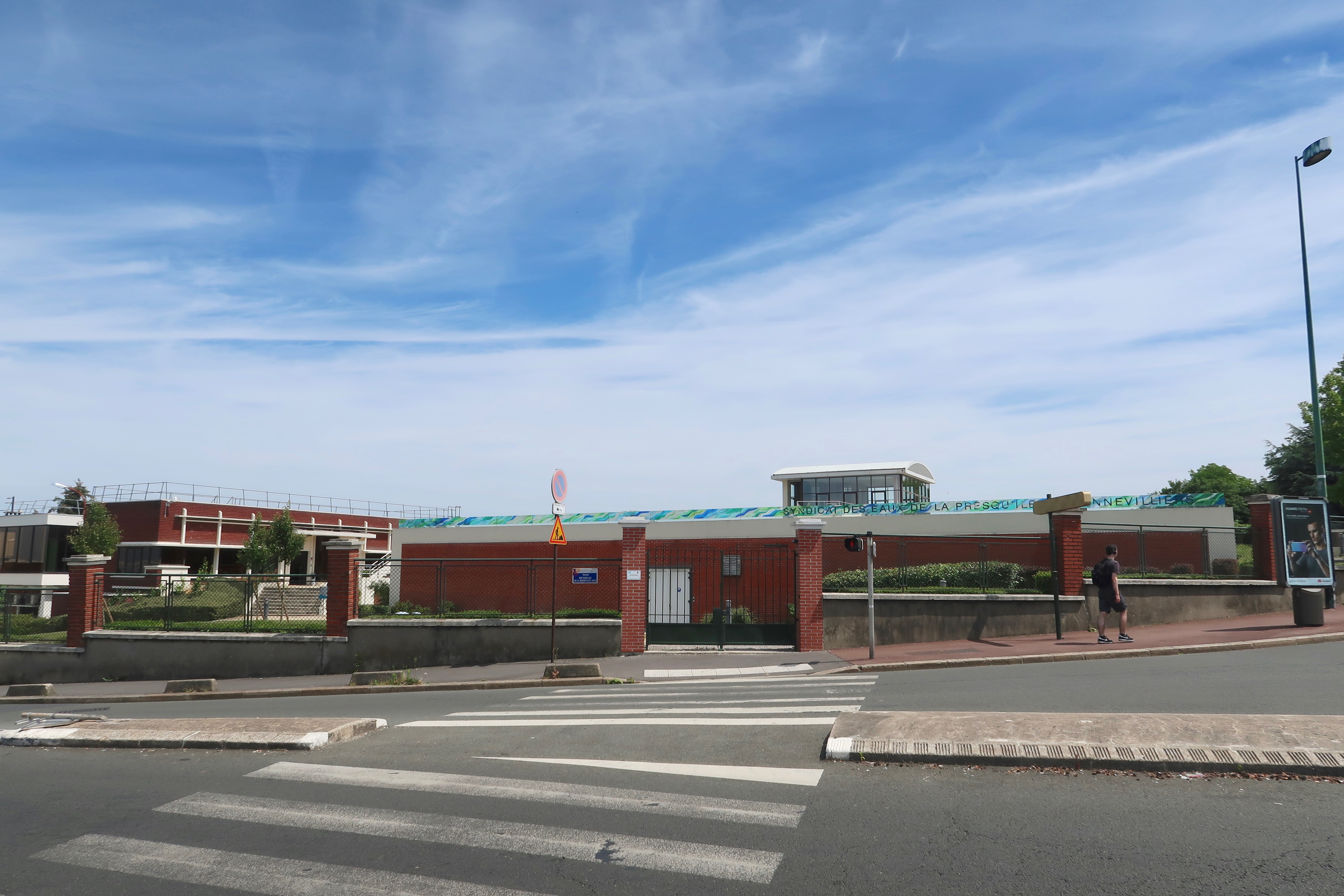 Usine de traitement des eaux, route des Fusillés de la Résistance à Suresnes (Hauts-de-Seine).